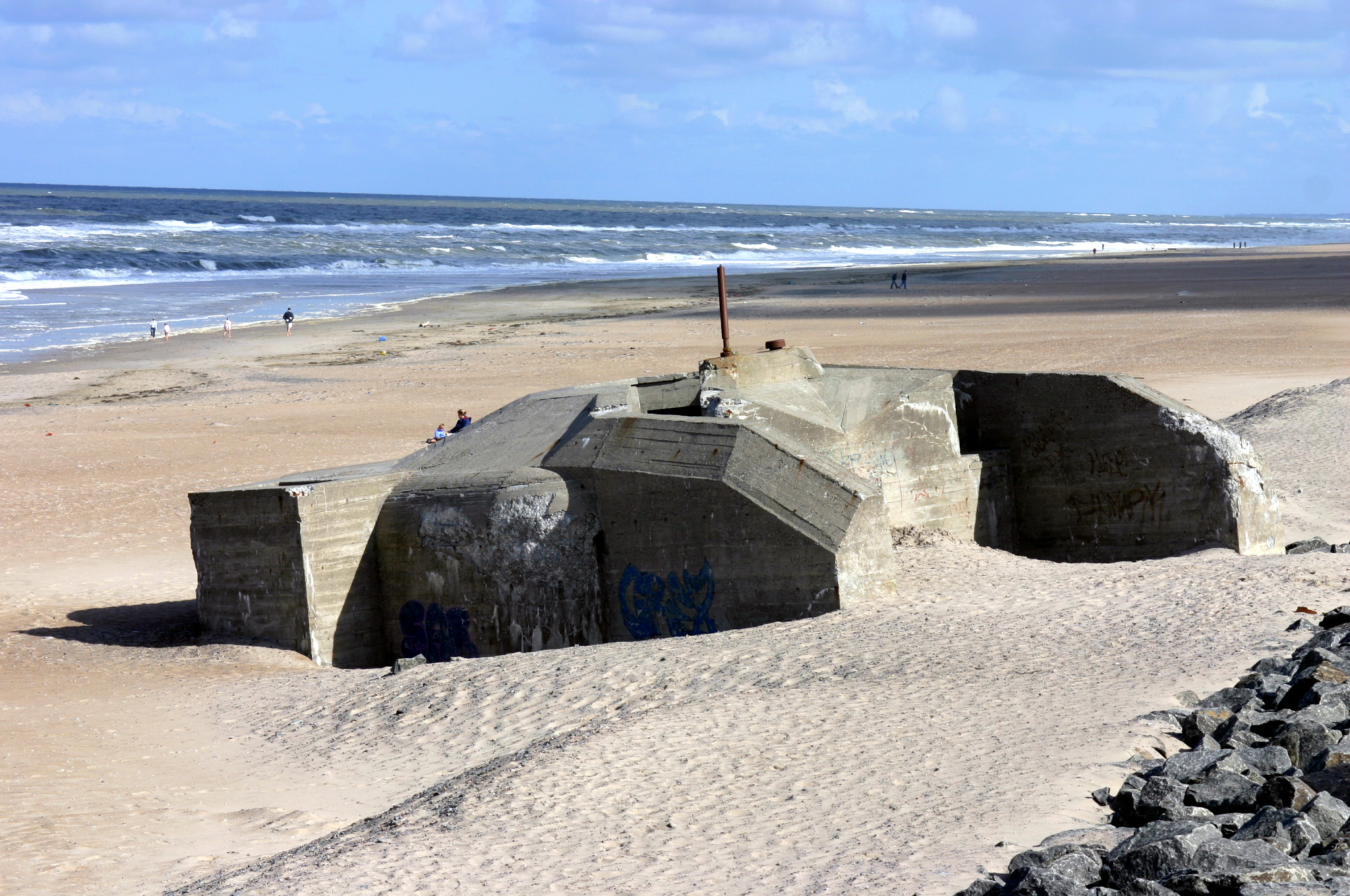 Søndervig, Denmark, German bunker at the beach